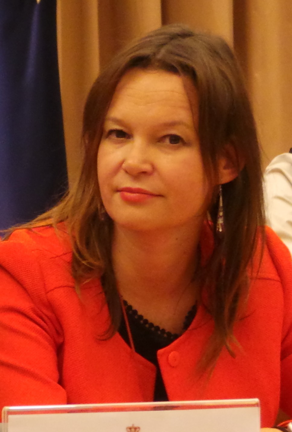 10 Aniversario de la Ley de Igualdad. Congreso de los Diputados. Madrid